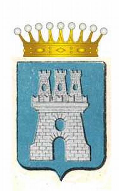 Wappen der Familie Siracusa